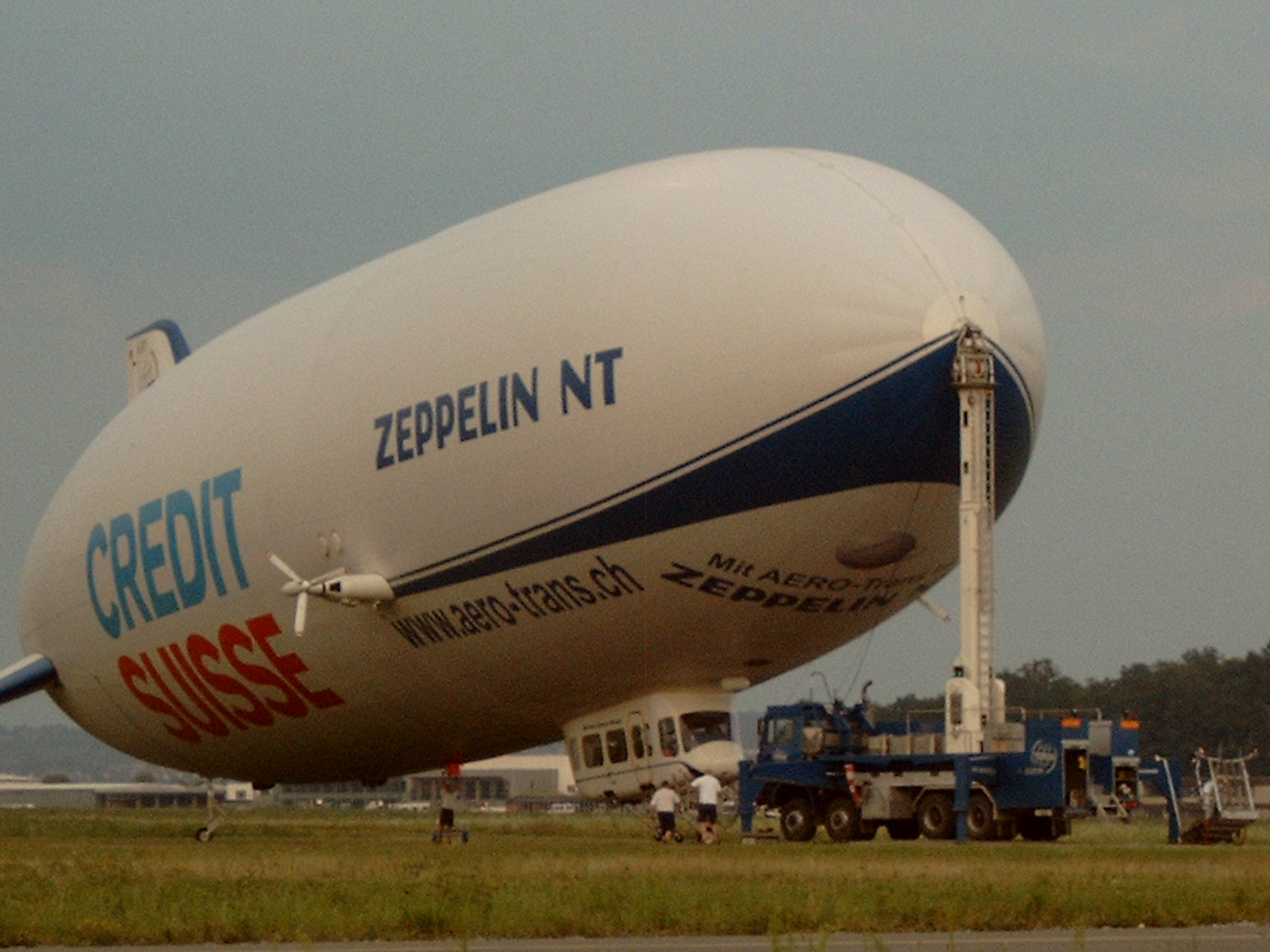 Zeppelin NT - Feierabend